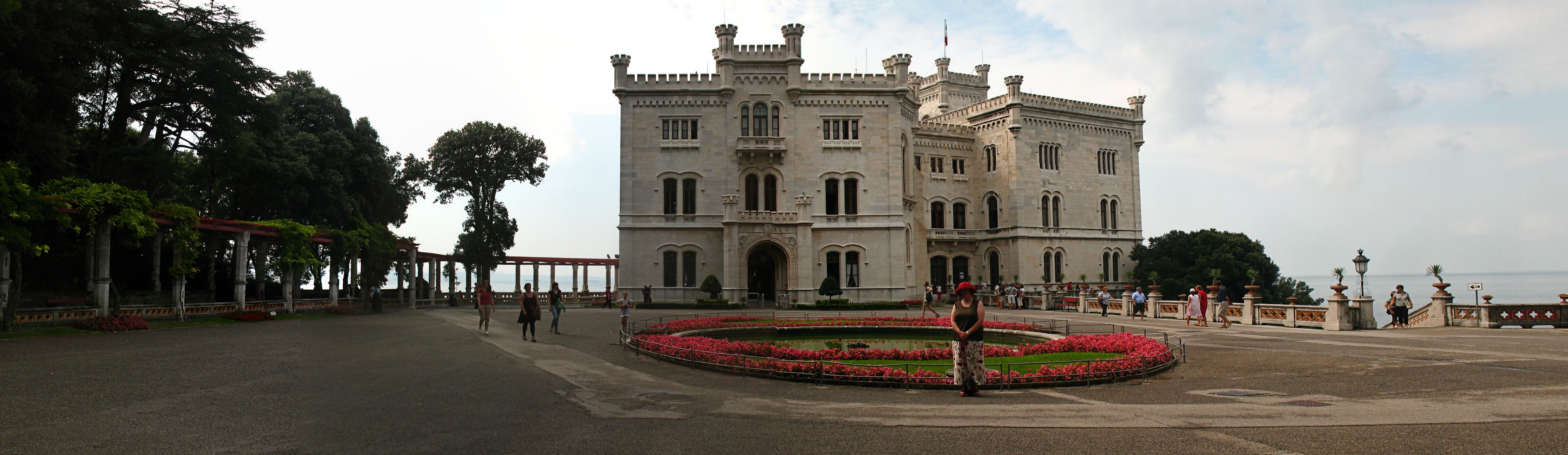 Italien, Triest, Schloss Miramare, Panorama